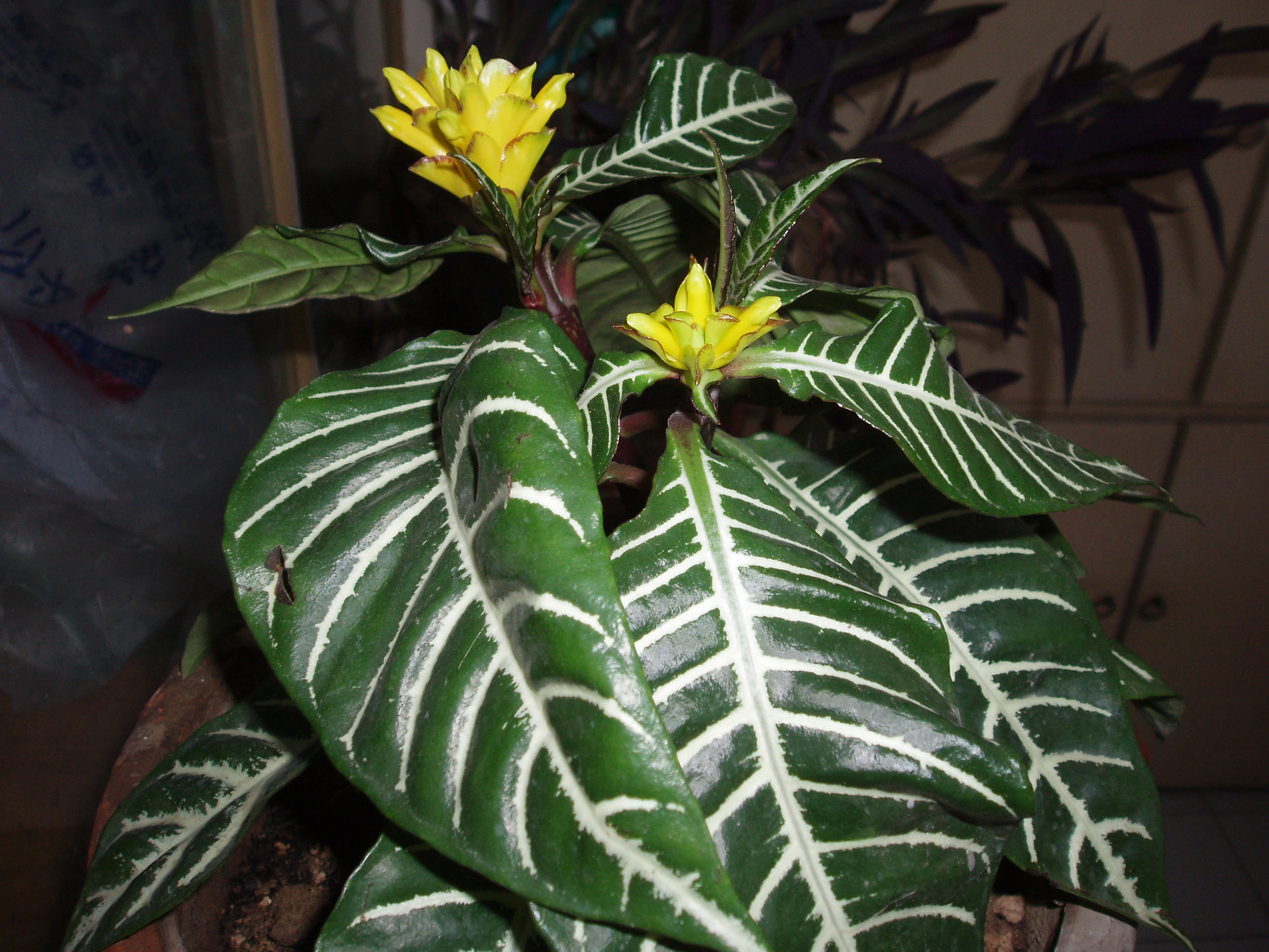 Zebra plant flowers